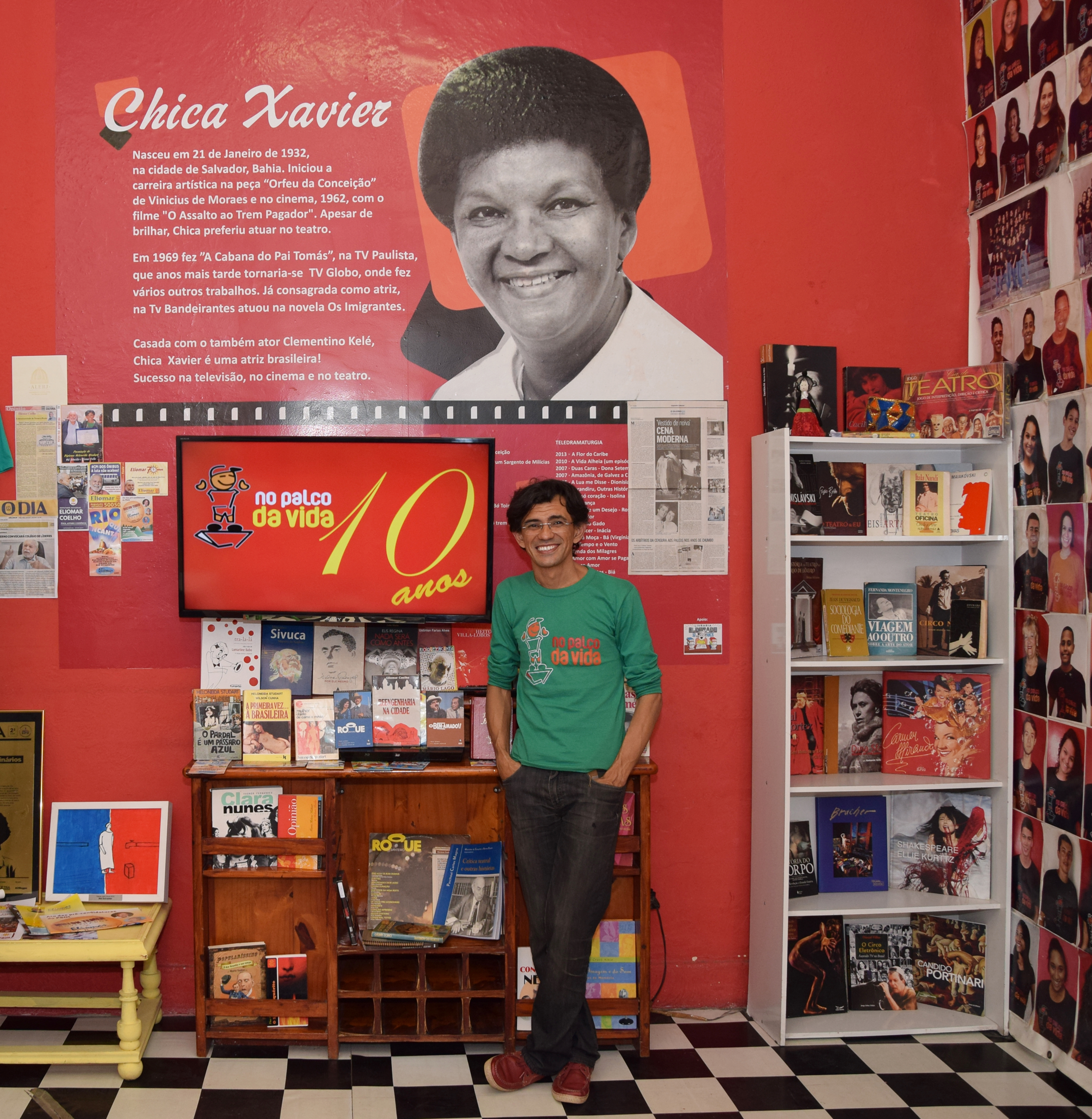 Wal Schneider na sala principal do projeto No Palco da vida (2017)